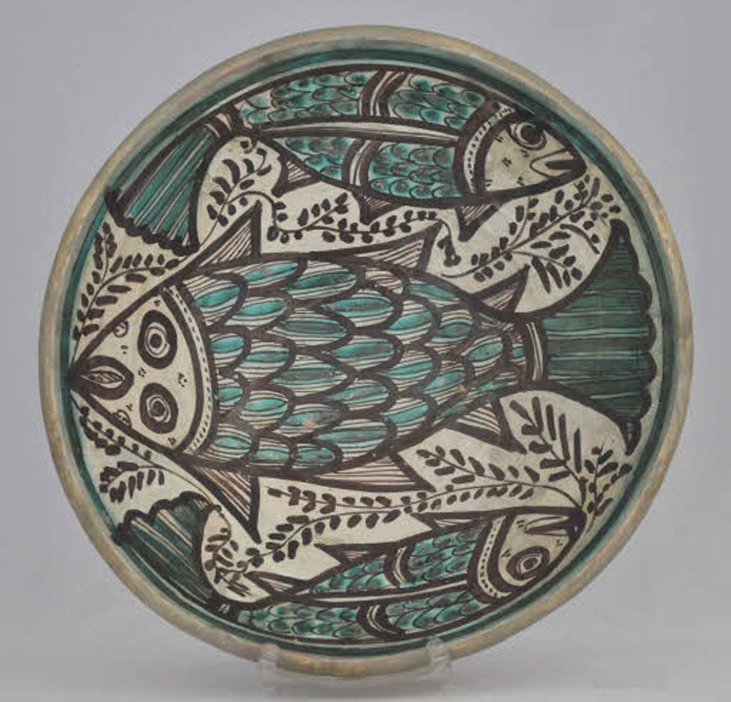 Fuente de cerámica de Paterna de autor anónimo. Siglo XIII-XIV Museo de Cerámica de Barcelona.Spain